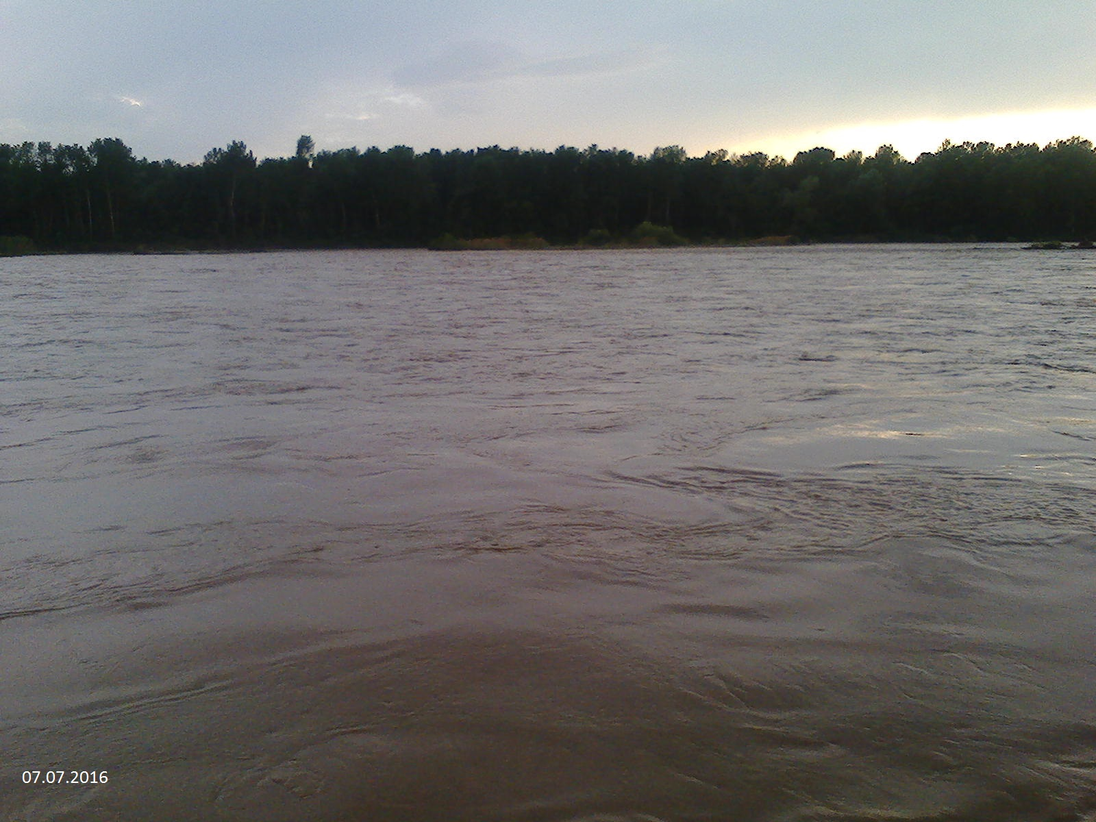 Июль, после обильных осадков в горах